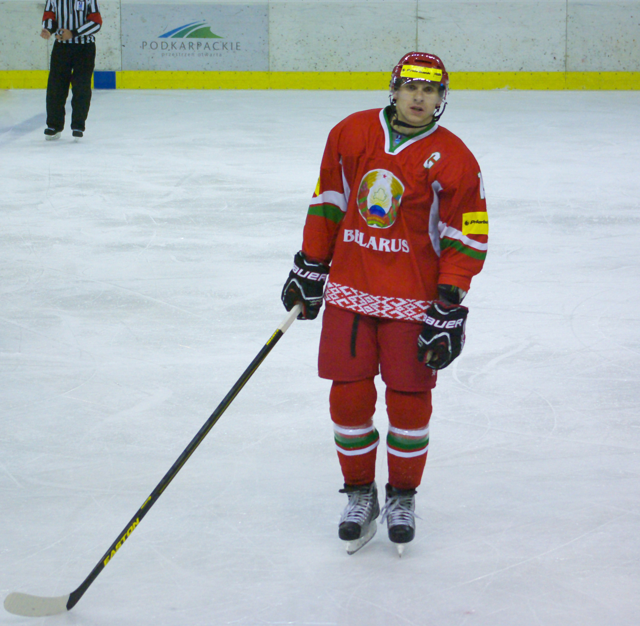 Artur Haurus podczas Mistrzostw Świata Juniorów w Hokeju na Lodzie 2014 I Dywizji w Sanoku, Białoruś - Dania 4:5, Arena Sanok 18 grudnia 2013